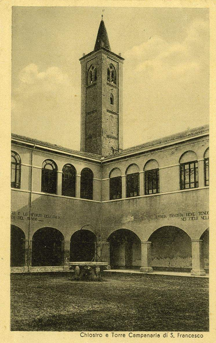 Chiostro e Torre Campanaria di S. Francesco (Mirandola)